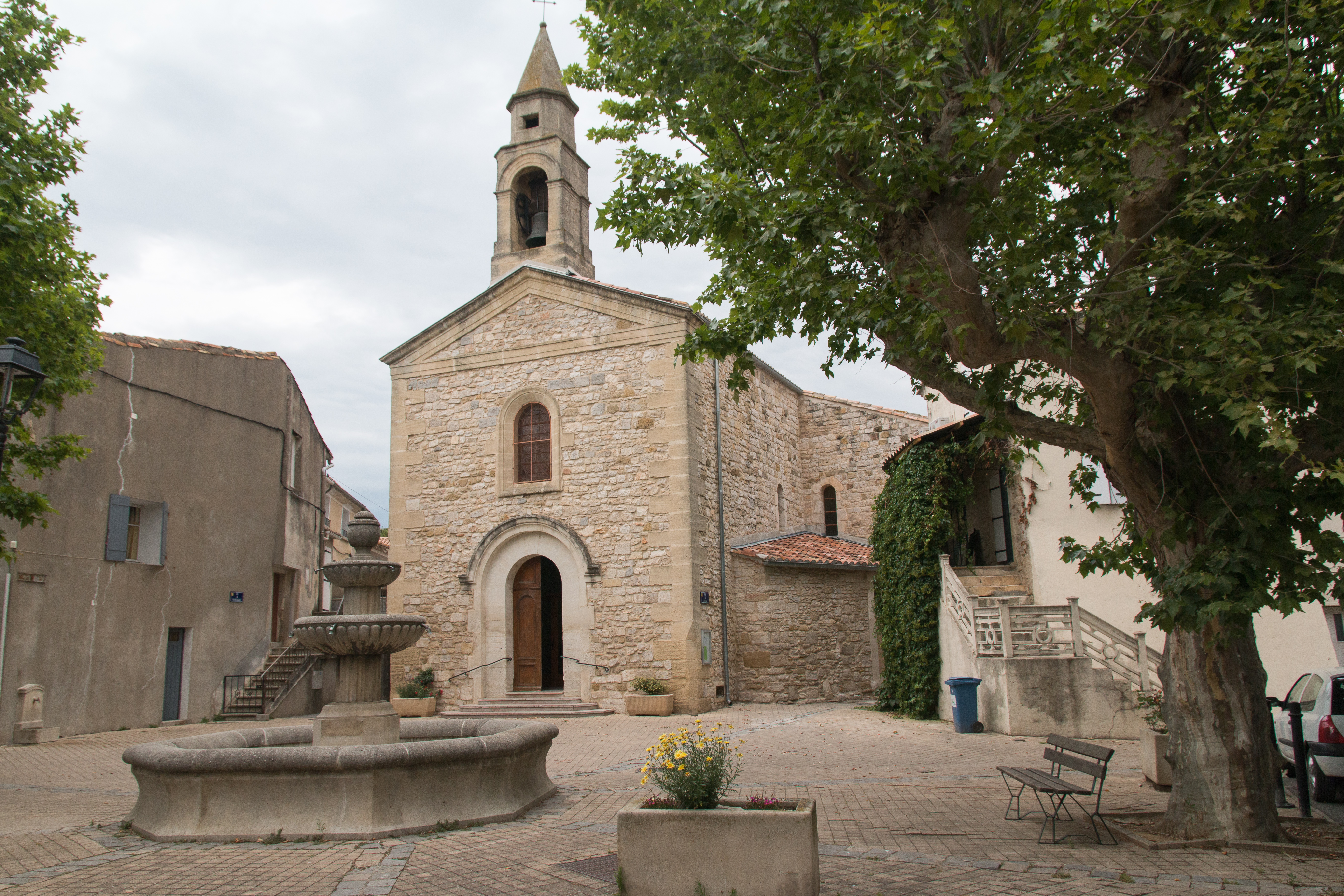 Church Saint Saturnin, Alphonse Daudet square.